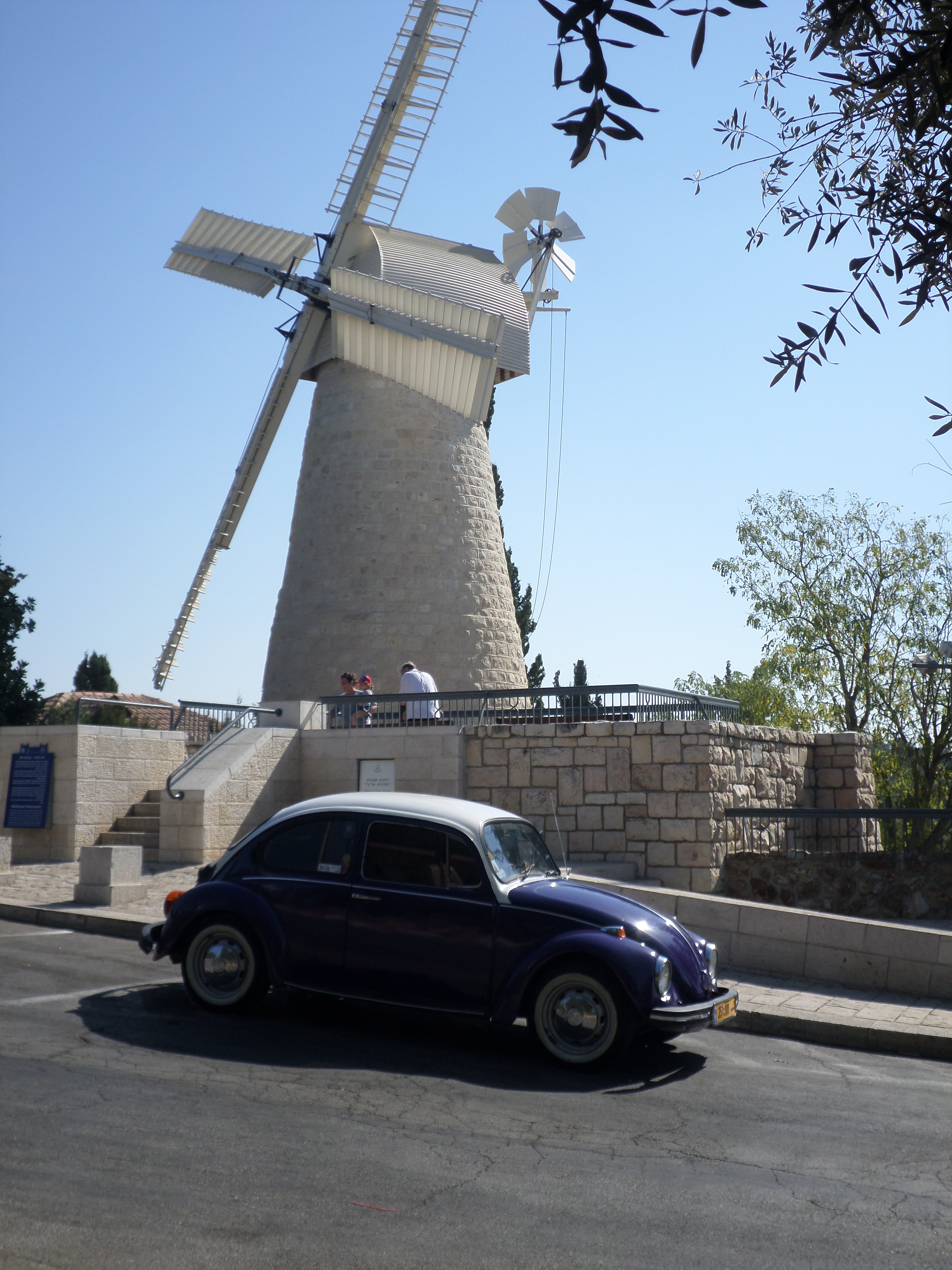 חיפושית ברקע טחנת הרוח (הקמח) ימין משה בירושלים